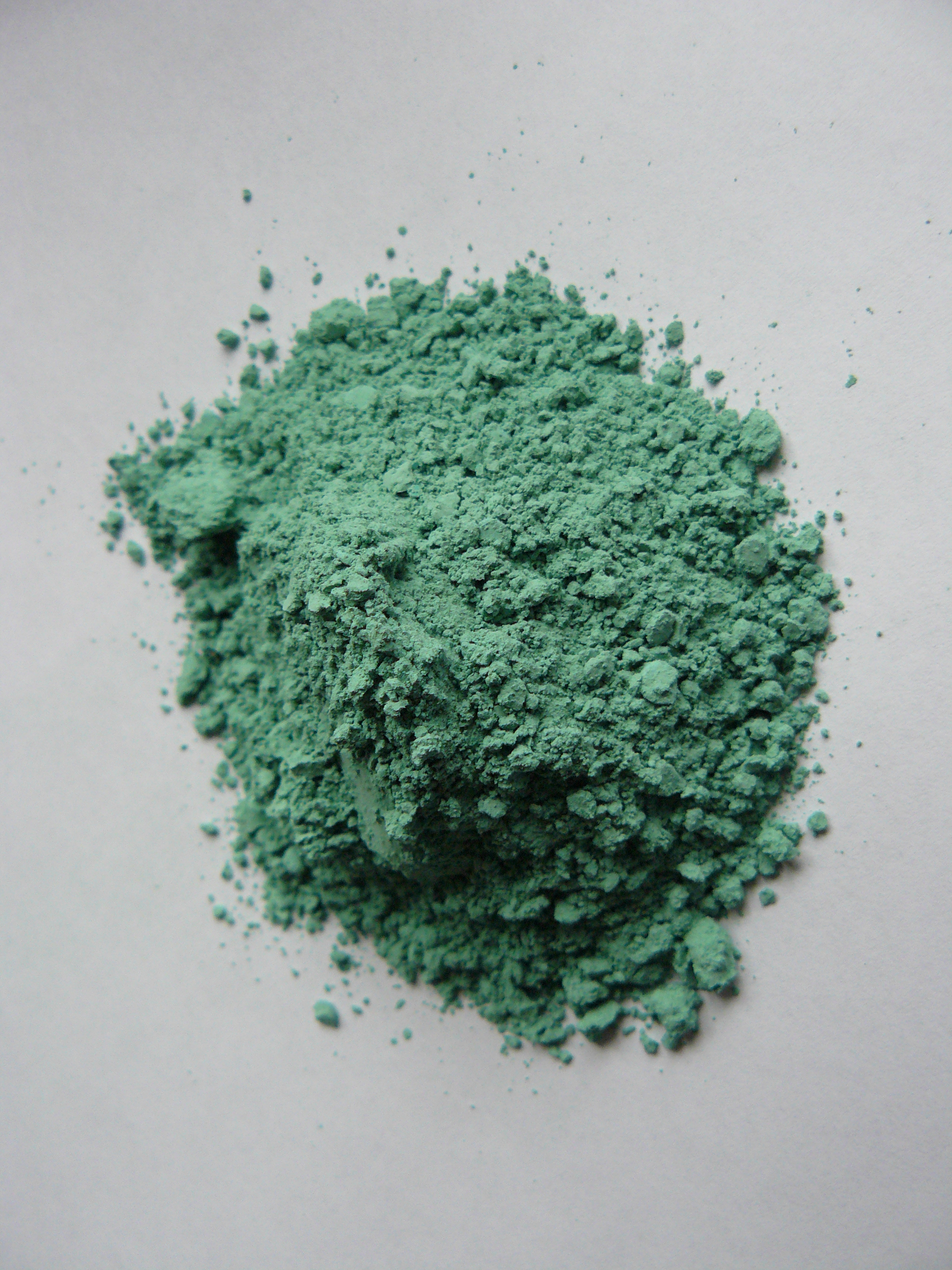 Idrossido di rame(II)